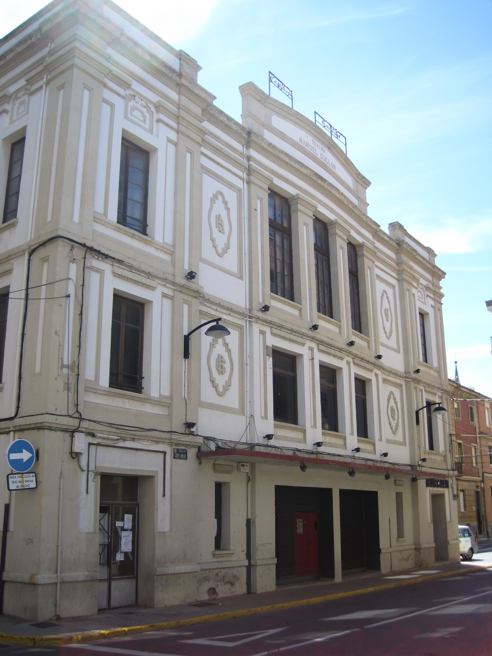 Teatro Gullón, en Astorga (provincia de León, España).